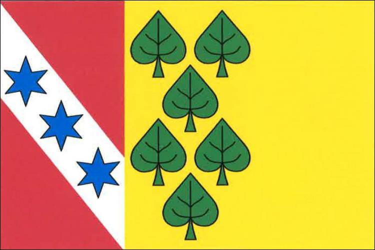 Vlajka, Prosenická Lhota, okres Příbram